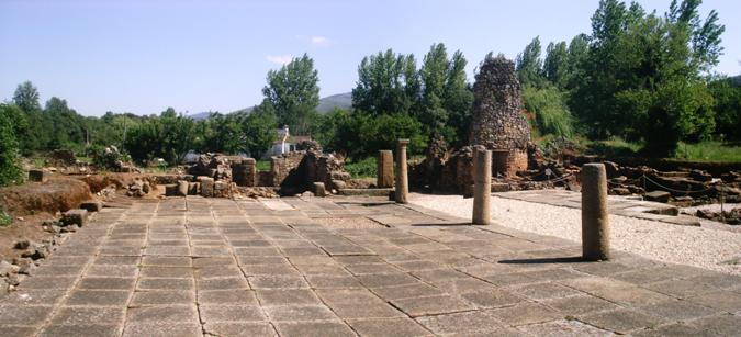 Praça da cidade romana de Ammaia